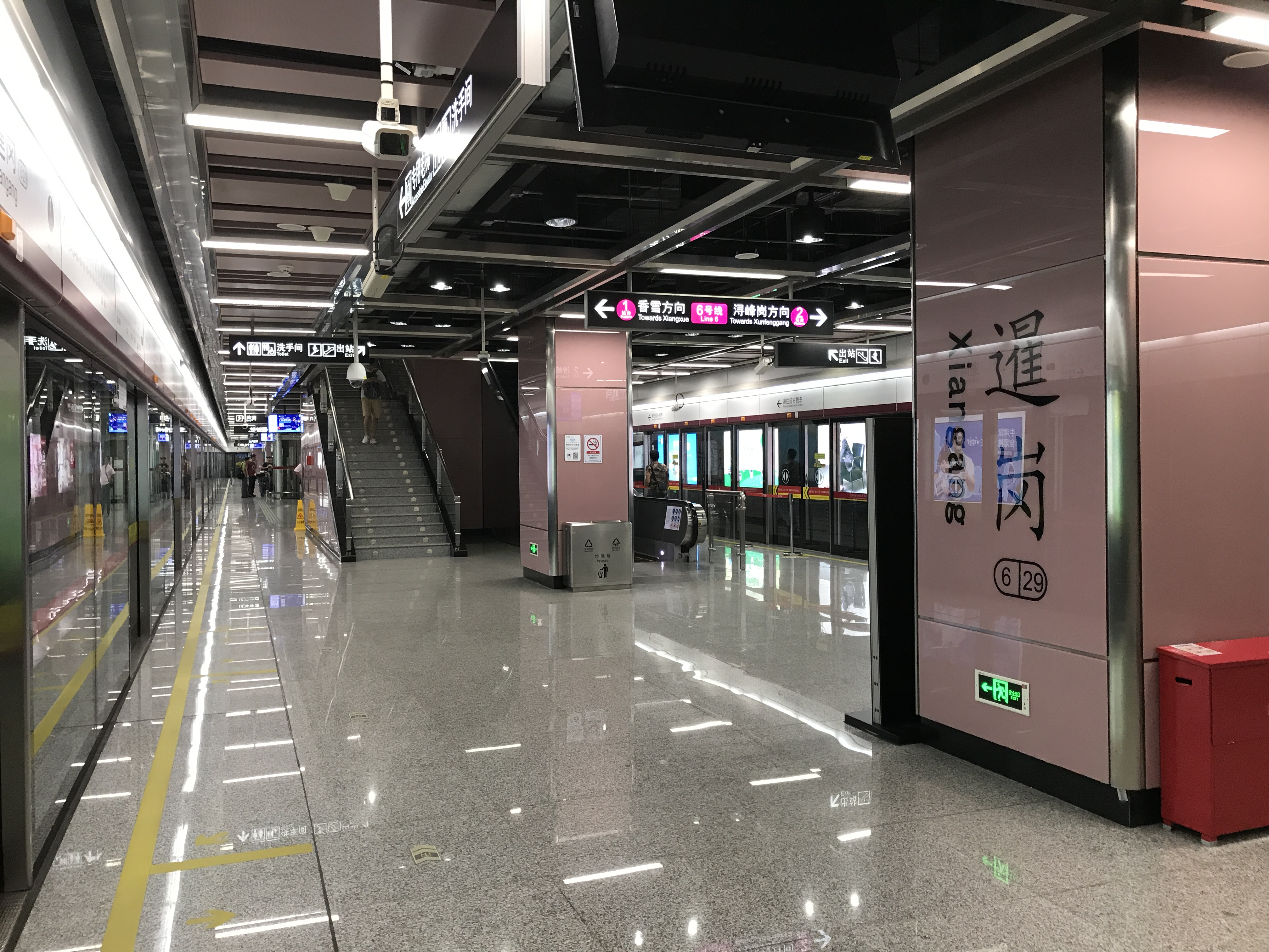 广州地铁暹岗站